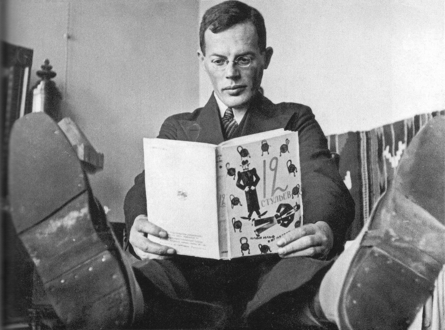 Илья Ильф читает книгу "Двенадцать стульев"